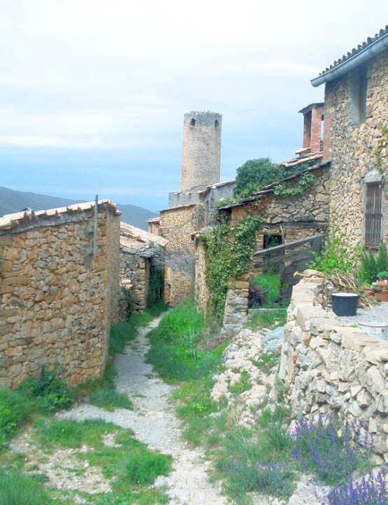 Foto d'Alsamora (Sant Esteve de la Sarga)